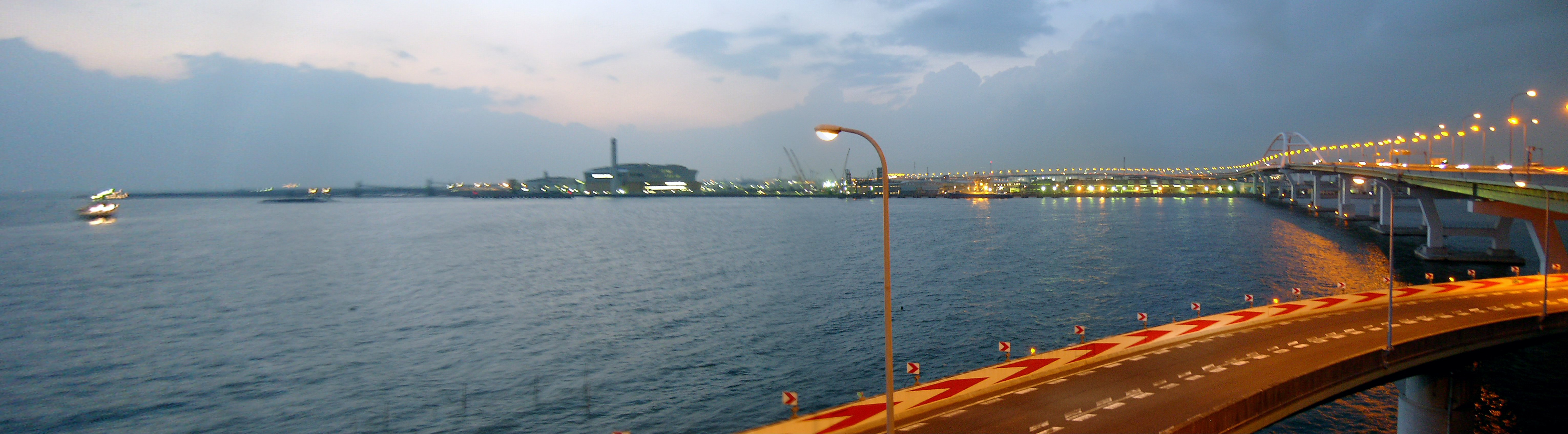 中島パーキングエリア からの眺め Copyright OpenCage